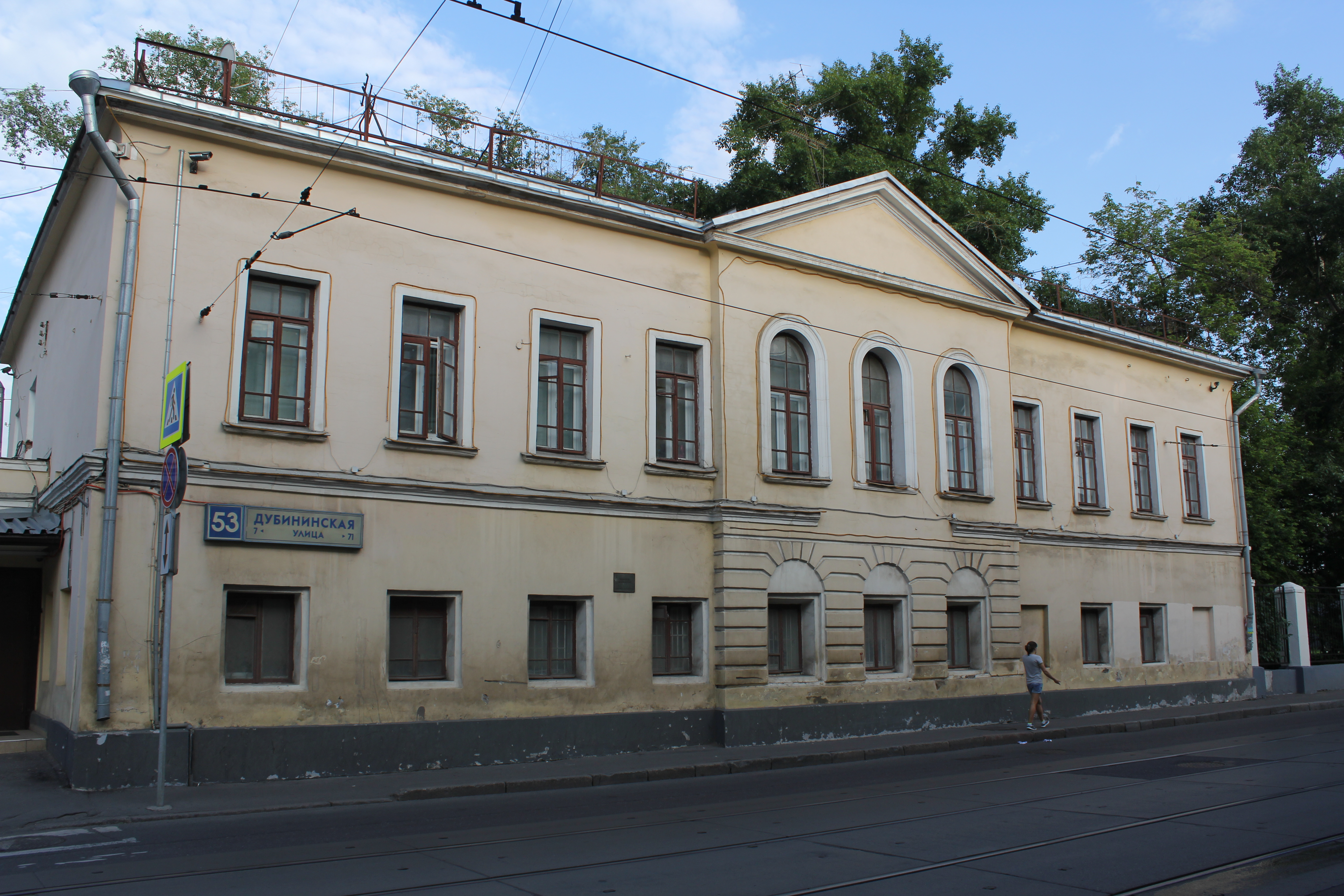 Жилой дом 1-й трети XIX века, расположенный по адресу: г. Москва, ул. Дубининская, д. 53, представляет собой двухэтажное каменное здание с антресолью, со сводчатым цокольным этажом, которое входило в состав обширной усадьбы с садом и прудами. Фасады решены в стиле классицизма и сохранились до наших дней с незначительными искажениями. Зданию присвоен статус памятника архитектуры федерального значения.